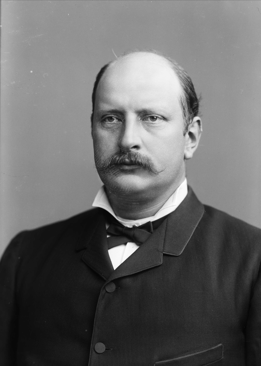 Frithjof Ingier, godseier.